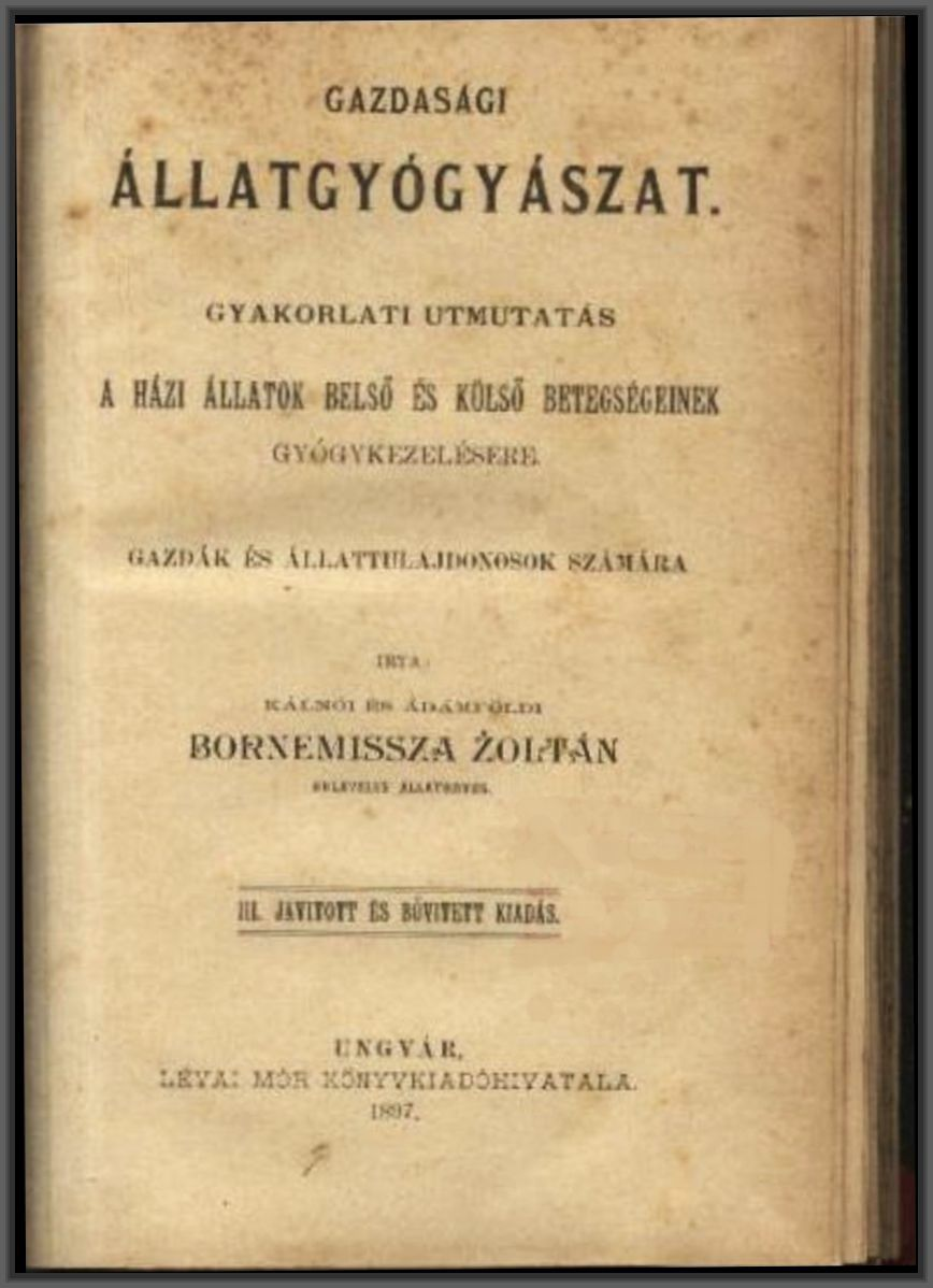 Gazdasági állatgyógyászat. Gyakorlati útmutatás a házi állatok belső és külső betegségeinek gyógykezelésére. Gazdák és állattulajdonosok számára. (264, VII. lap.) 3. kiadás. Ungvár, 1897